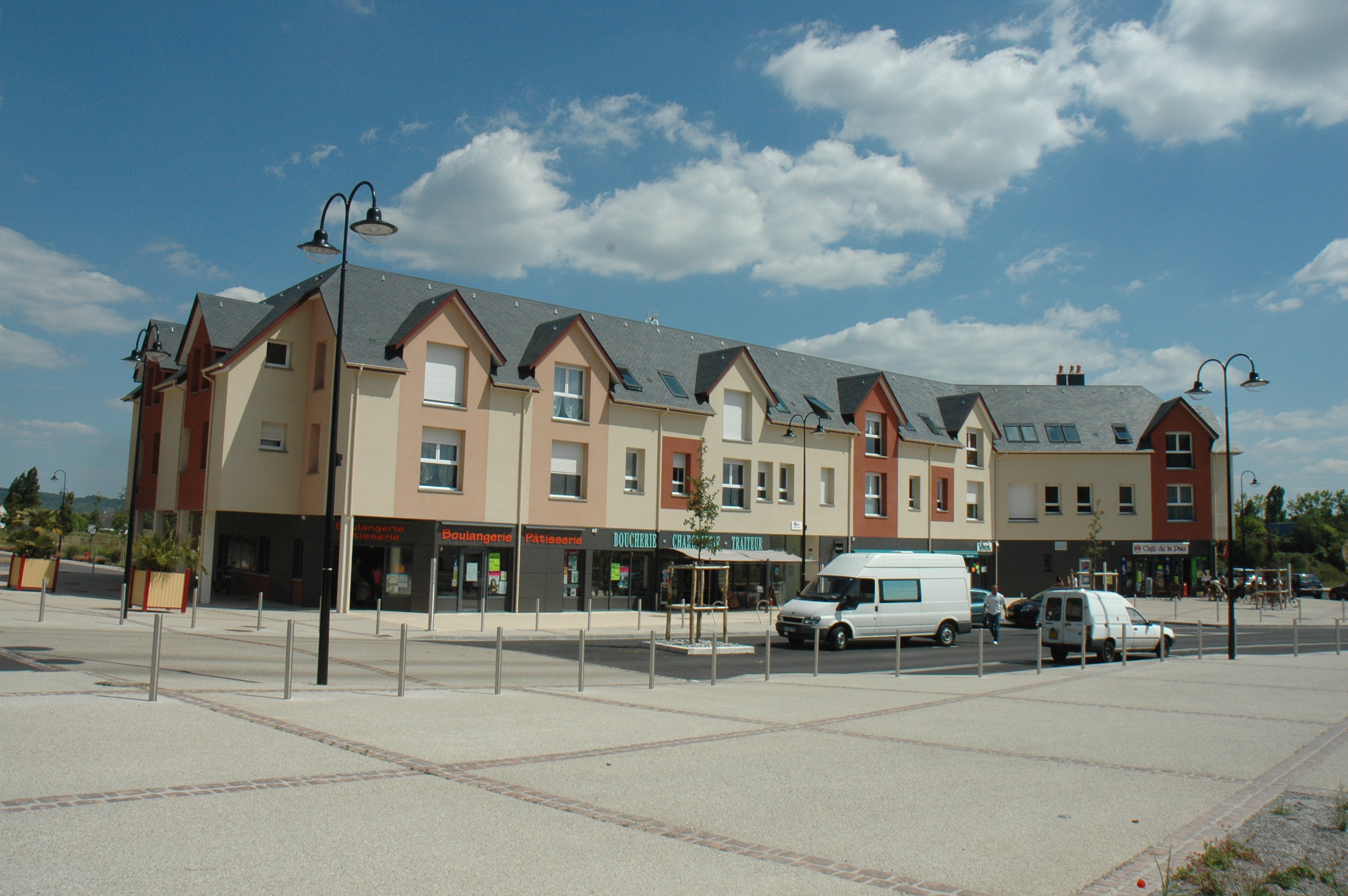 Eco village La croix